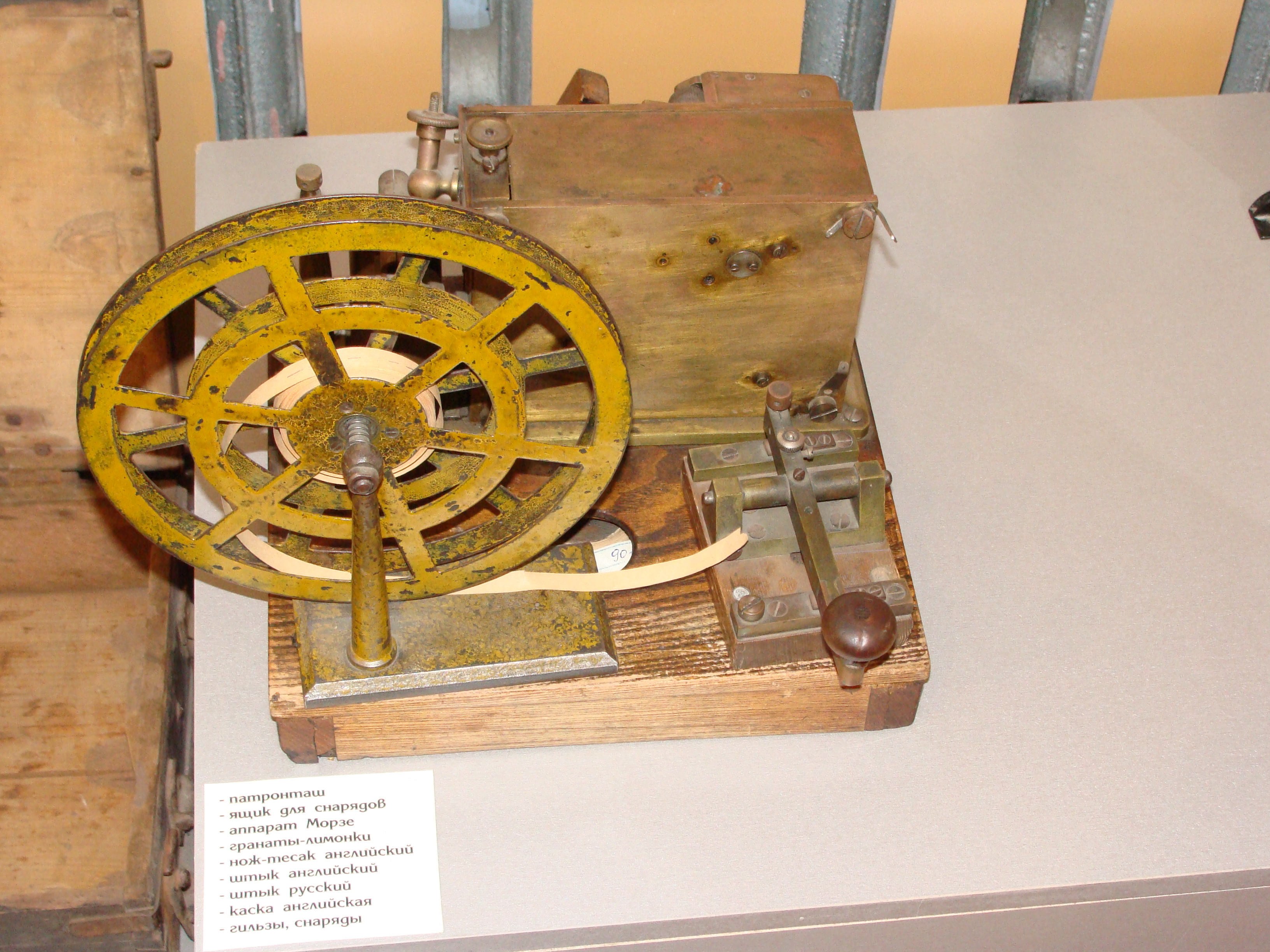 Котласский краеведческий музей. Аппарат Морзе